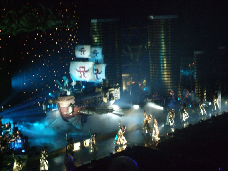 Hamasaki Ayumi concert @ Osaka Jo Hall (Sat Jun 21, 2008)